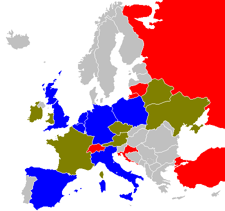 Top division II. division III. division